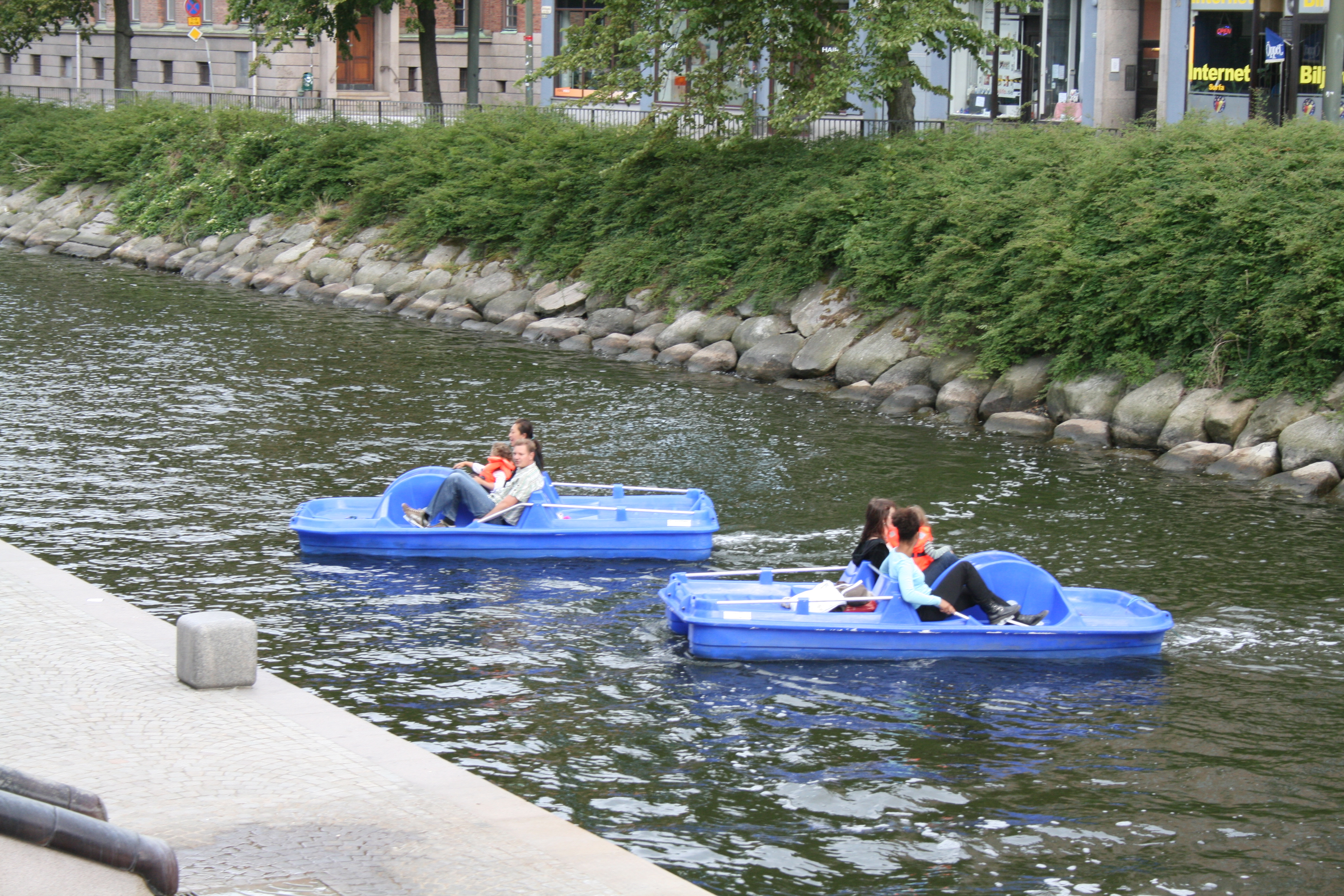 I Basshunters fotspår